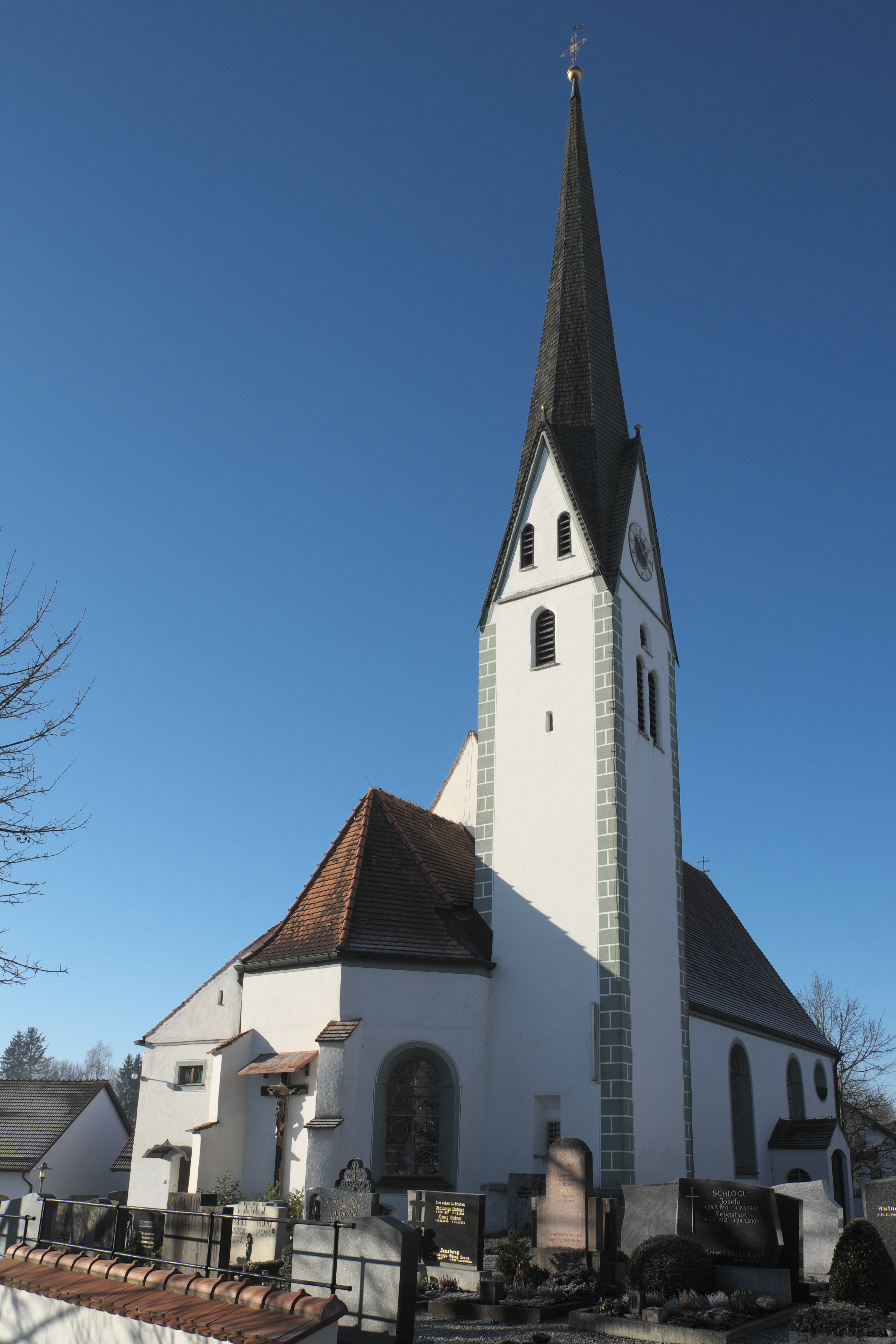 Katholische Pfarrkirche Zur Schmerzhaften Muttergottes in Unterfinning (Finning) im oberbayerischen Landkreis Landsberg am Lech (Bayern/Deutschland)